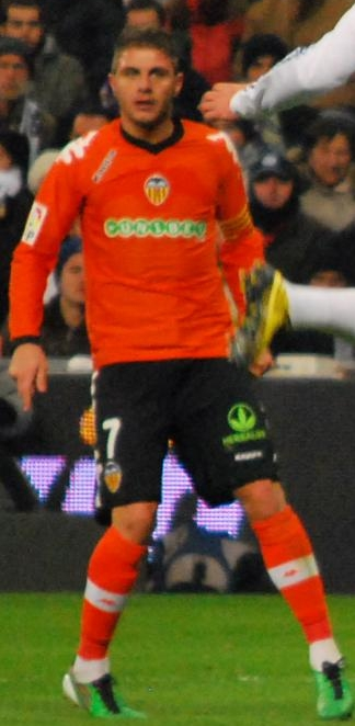 Joaquín Sánchez, desembre del 2010.